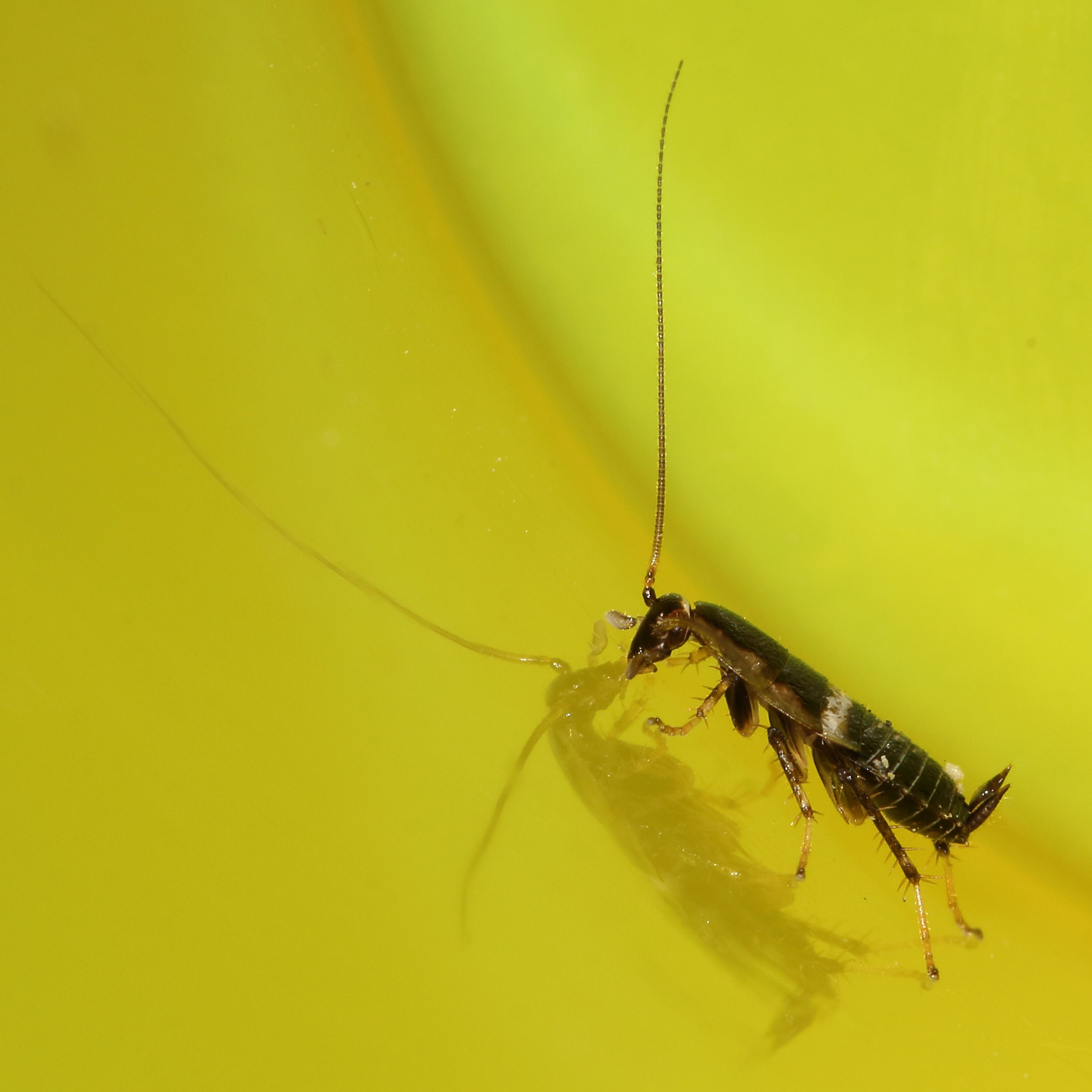 Planuncus tingitanus nymph lateral